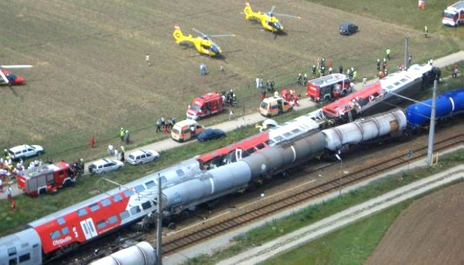 Bei Gramatneusiedl kam es zu einer Flankenkollision zwischen einem Doppelstockzug und einem Verschubgüterzug. Nach Beendigung des Fahrgastwechsels gab die Zugbegleiterin den Abfahrauftrag. Der Lokomotivführer fuhr trotz des geschlossenen Ausfahrsignals los und beschleunigte. Der 500-Hz-Gleismagnet der PZB löste eine Zwangsbremsung aus, die jedoch den Zusammenstoß mit dem Güterzug nicht mehr verhindern konnte. 9 Reisende wurden schwer, 12 Personen leicht verletzt. Es entstand erheblicher Sachschaden.